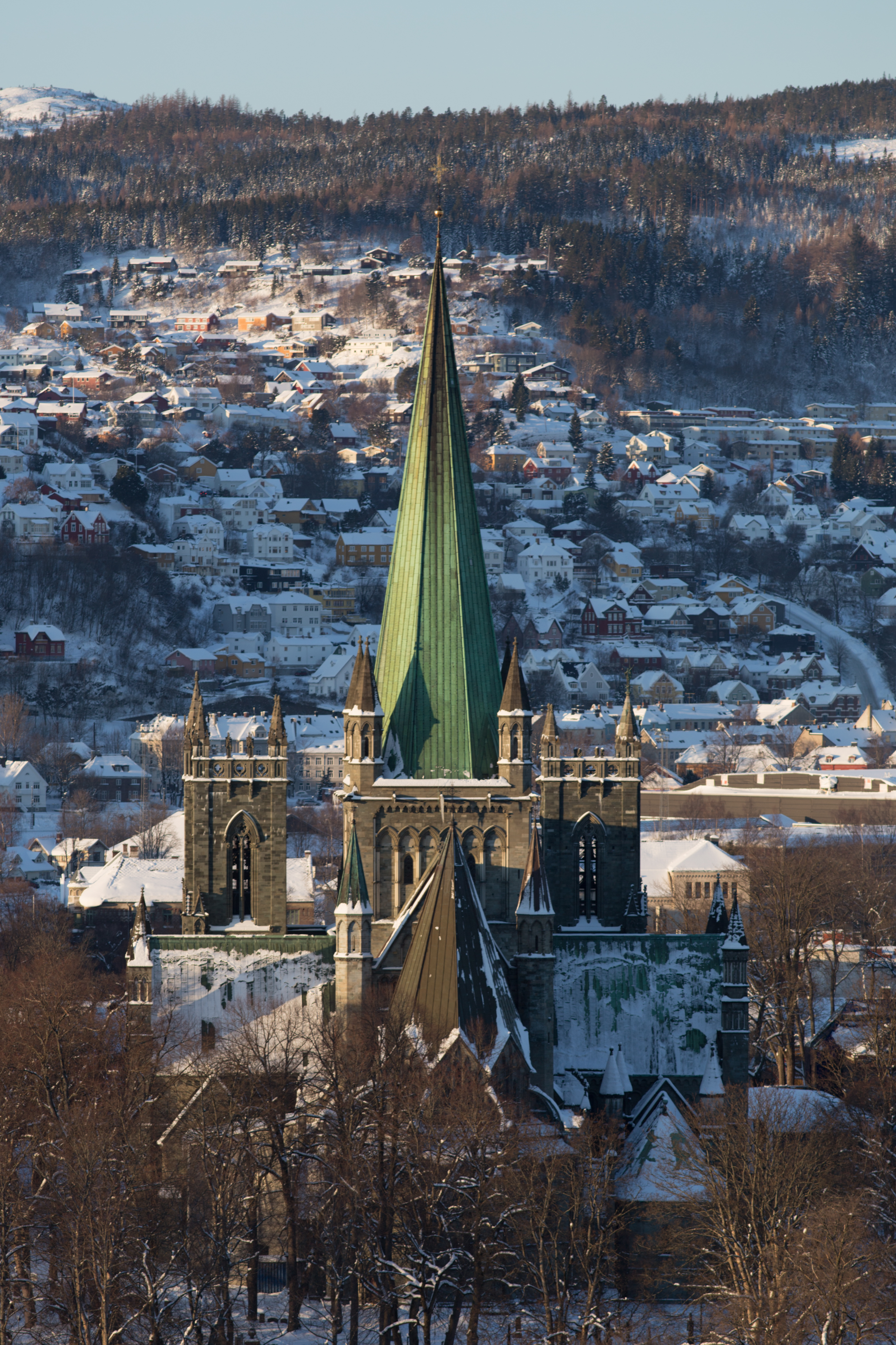 Nidarosdomen fra øst/Kristiansten festning